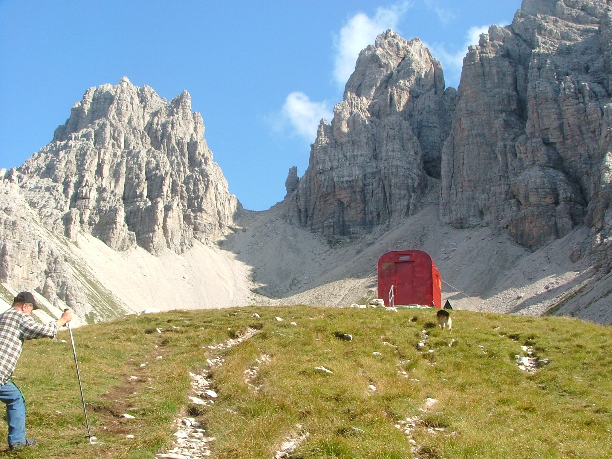 Bivacco Perugini, Val Montanaia, Cimolais, Pordenone, Italy